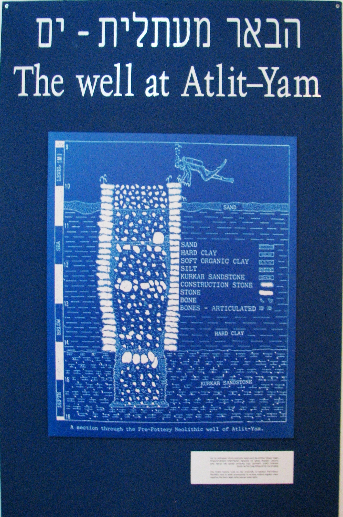 Atlit Yam is an ancient submerged Neolithic village off the coast of Atlit, Israel. The site is dated to the final Pre-Pottery Neolithic B site of Atlit Yam dates between 6900 and 6300 BC. Moshe Stekelis Museum of Prehistory exhibition in Haifa Israel The exhibition is based on the excavations and researches of the Haifa University and Antiquities Authority. Photography by Yosef Galili, Ehud Galili, Itamar Greenberg הכפר הניאוליתי בעתלית-ים שוכן בתוך הים במרחק 400 מטר מקו החוף, מערבית לשפך נחל אורן בעורפו של רכס כורכר טבוע שבהמשכו דרומה נמצא מבצר עתלית הצלבני. האתר נמצא בעומק של 12-8 מטר מתחת לפני הים. האתר מתוארך לסוף התקופה הנאוליתית קדם קרמית ב סוף האלף ה-6 לפנה"ס ממצאים מהאתר מוצגים במוזיאון לפרהיסטוריה ע"ש משה שטקליס בחיפה הנמצא בתוך גן החיות במרכז הכרמל התערוכה מבוססת על חפירות ומחקרים שהתבצעו על ידי אוניברסיטת חיפה ורשות העתיקות הצילומים מהחפירות המוצגים בתערוכה צולמו על ידי יוסקה גלילי, אהוד גלילי ואיתמר גרינברג The oldest known well in the continent הבאר הקדומה ביותר שהתגלתה עד כה ביבשת. המצאת מתקן בתקופה זו אפשרה לאדם להתיישב קבע באזורים שבהם אין נביעת מים טבעי אך קיים מפלס של מי תהום